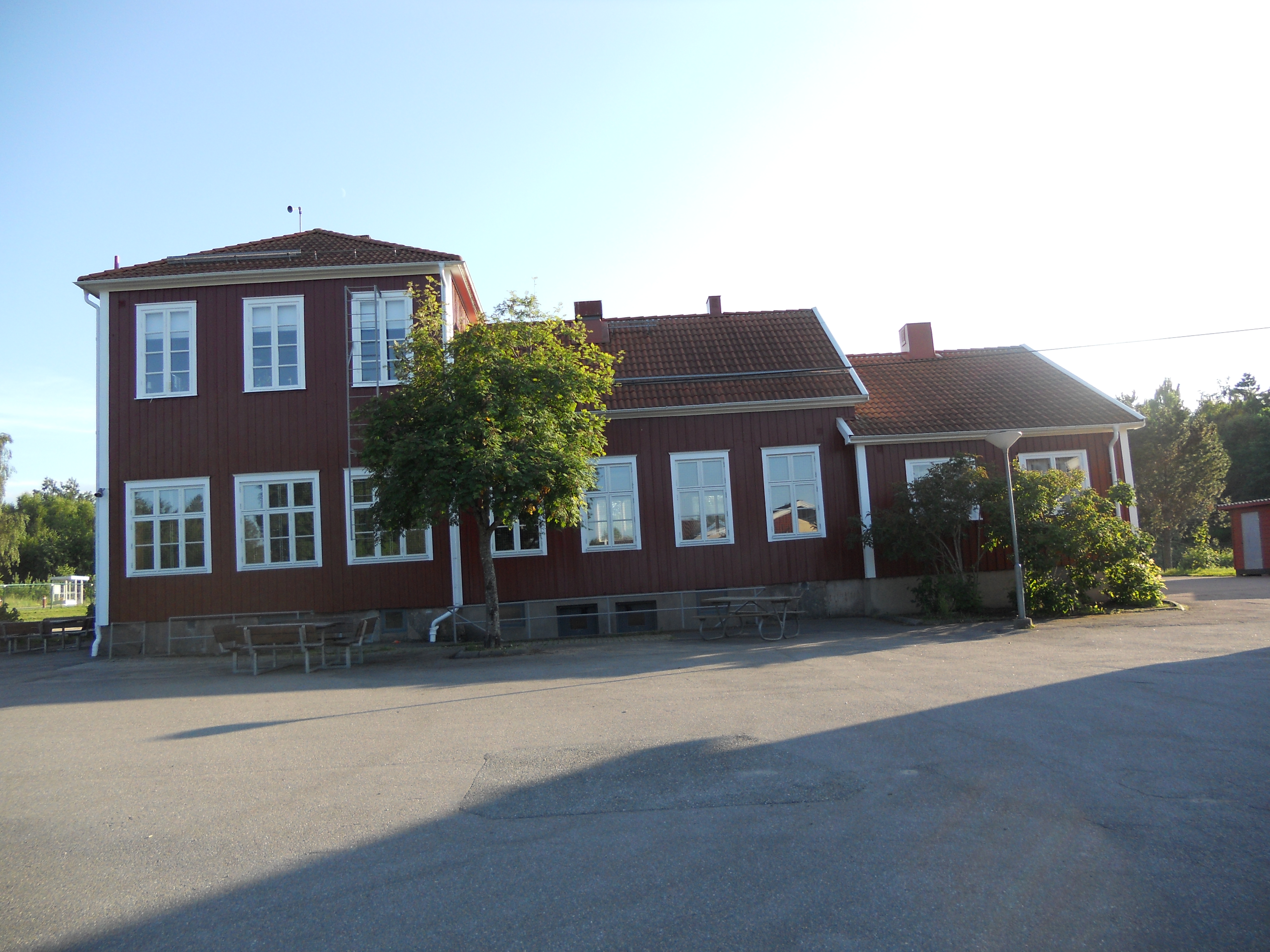 Fritids i Öxnered, vid Öxnereds skola.